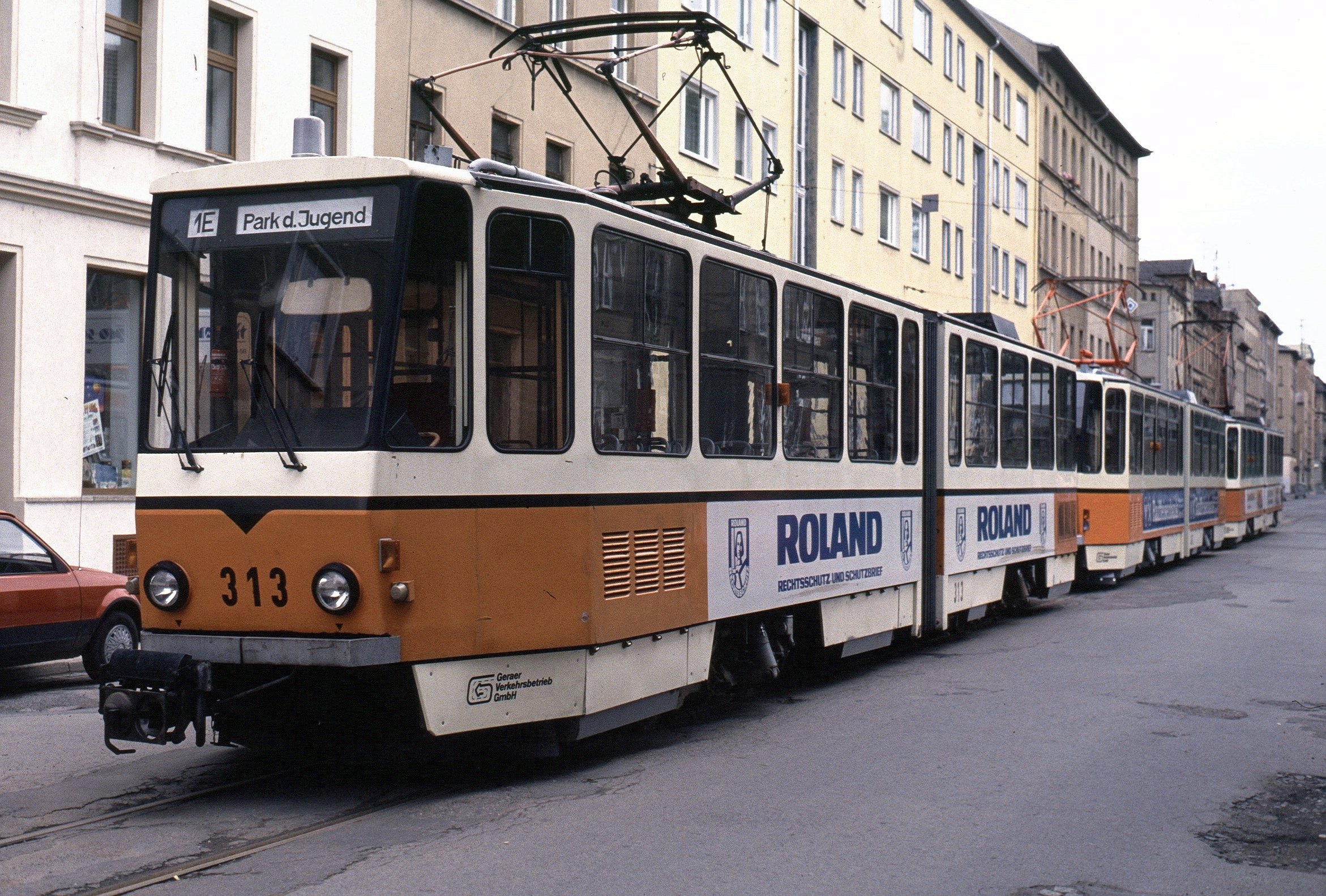 Template:Multilindual description